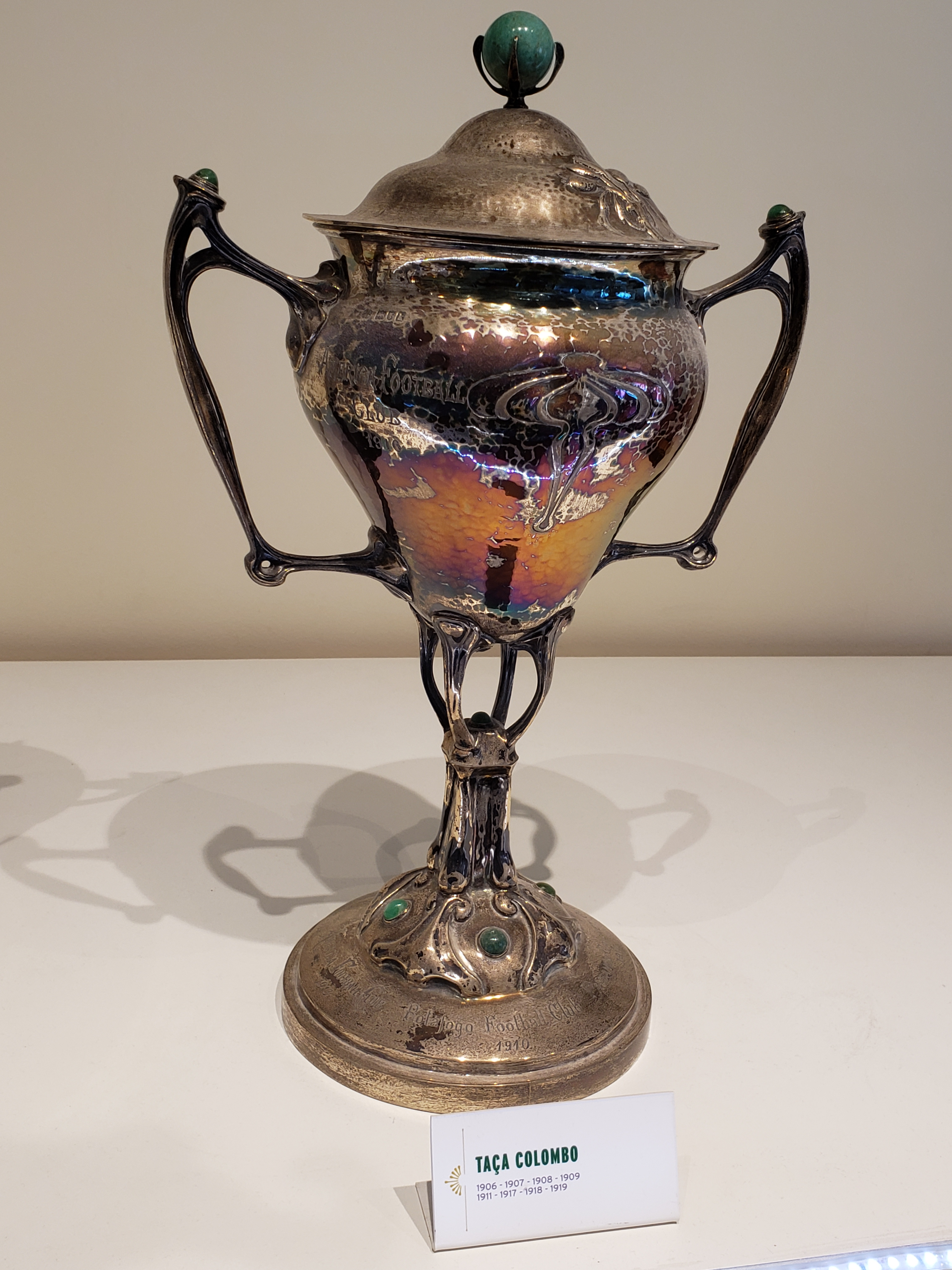 Taça Colombo, a primeira taça oficial do Campeonato Carioca, oferecida para o primeiro clube que se sagra-se tricampeão, de posso do Fluminense Football Club.